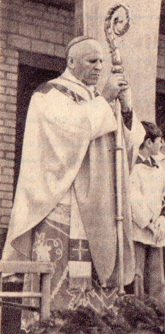 Biskup Władysław Jędruszuk.